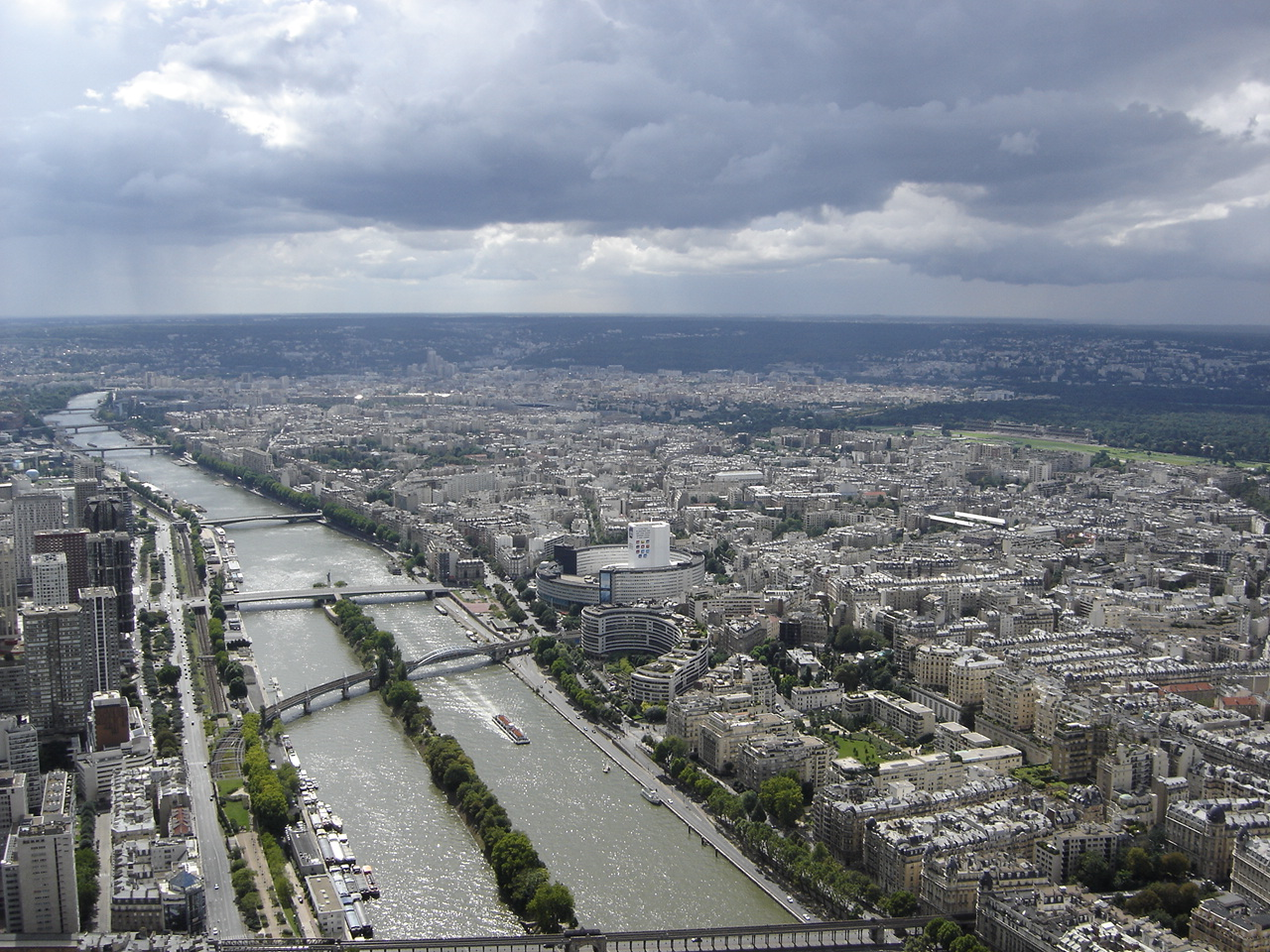 La Seine dalla tour Eiffel.